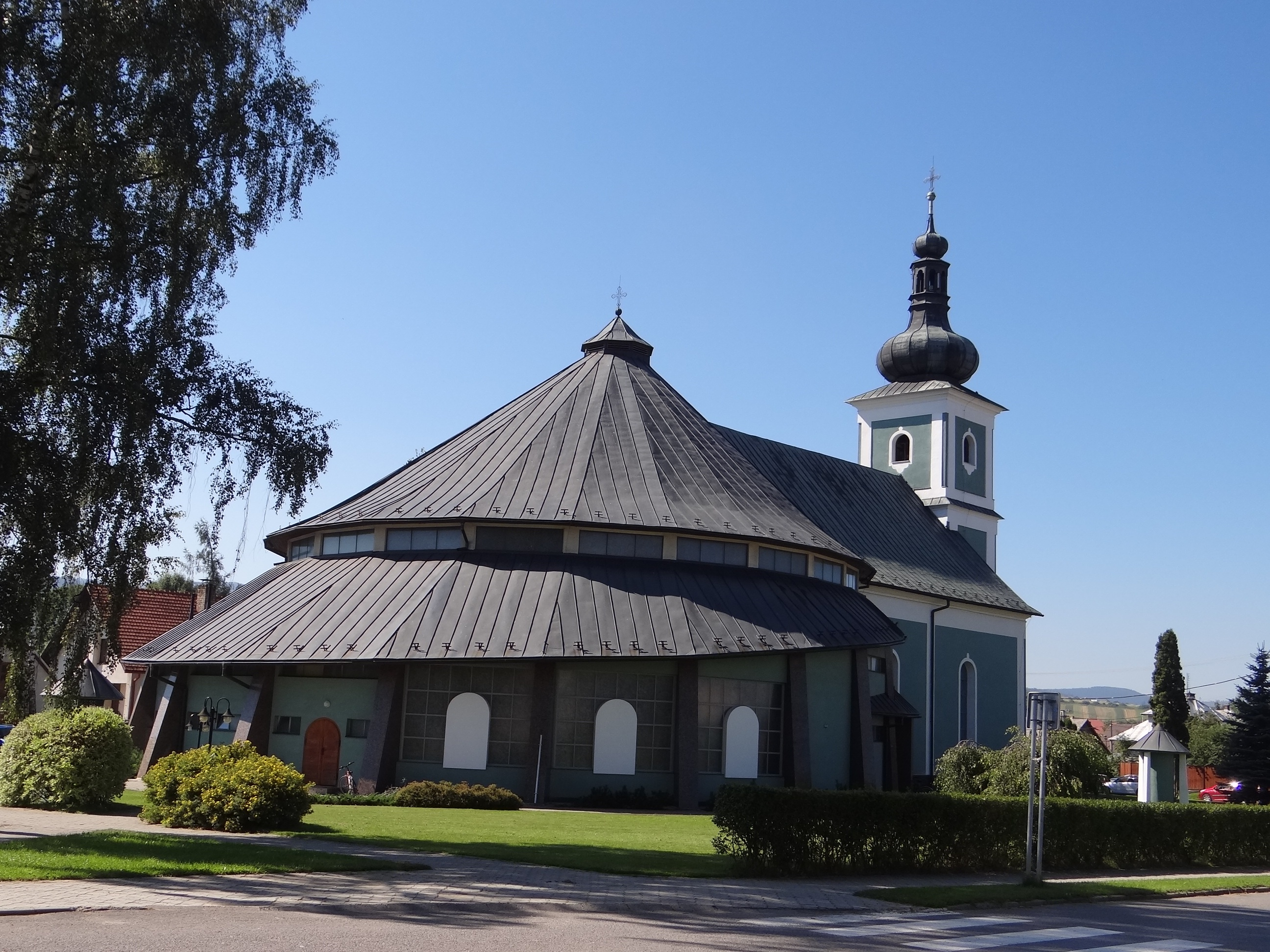 Liesek kostel (Kościół w Liesku)